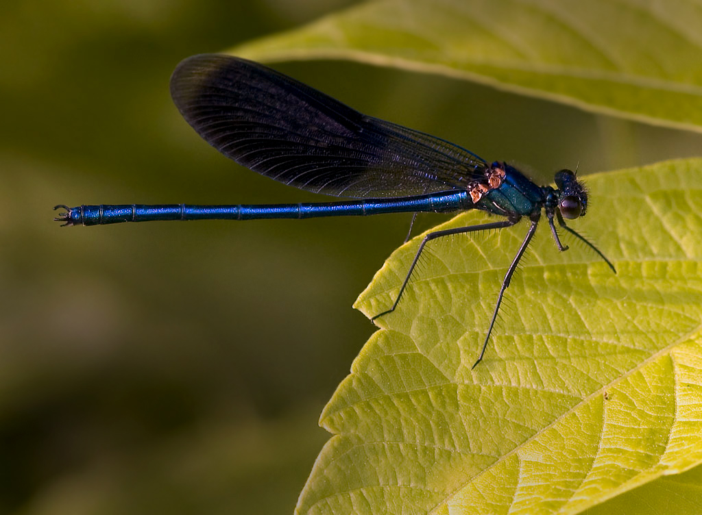 Blåbåndet vannymfe (Calopteryx splendens). Denne arten er sterkt truet og iferd med å forsvinne fra norsk natur.